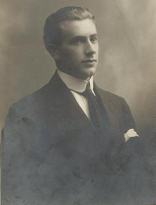 El profesor y matemático don José del Corral y Herrero.